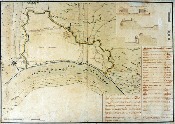 Карта укріплень фортеці Фзмаїл